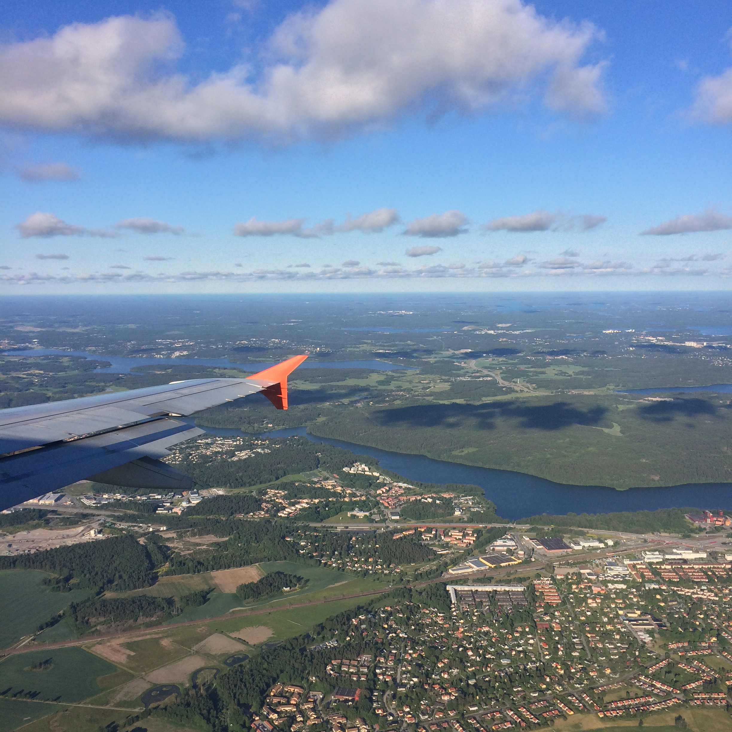 Eds Glesbygd, Sweden